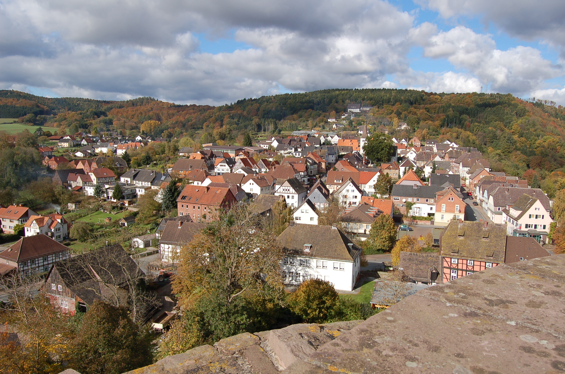 Ein Teil von Polle, vom Bergfried der Eversteinschen Burg aus gesehen